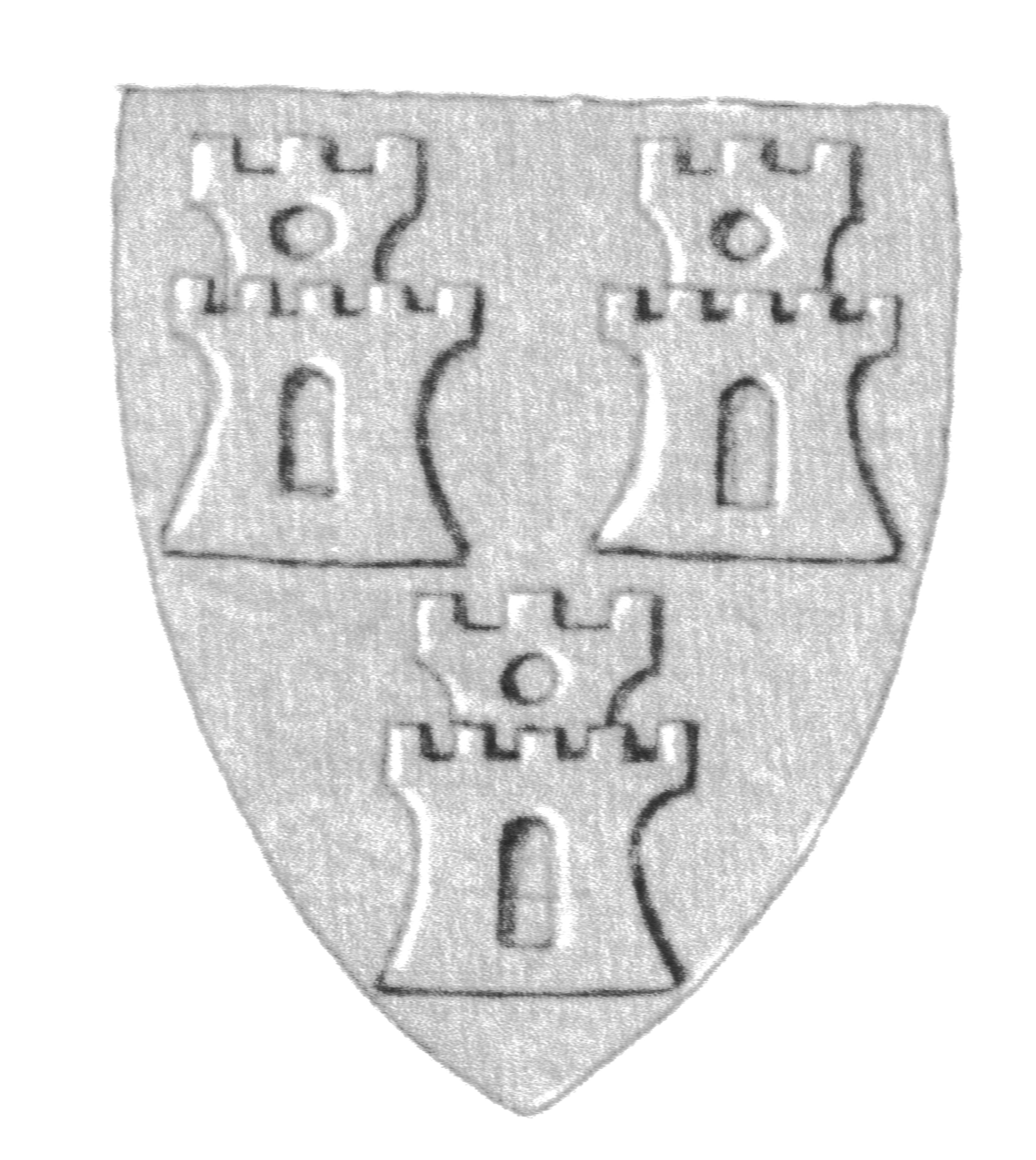 Siegel des Ratsmannes Alexander Lüneburg (Alexander Luneborch). Das Siegel stammt aus der Zeit um 1302. Siehe Emil Ferdinand Fehling: Lübeckische Ratslinie, Nr. 281 (Alexander Lüneburg).